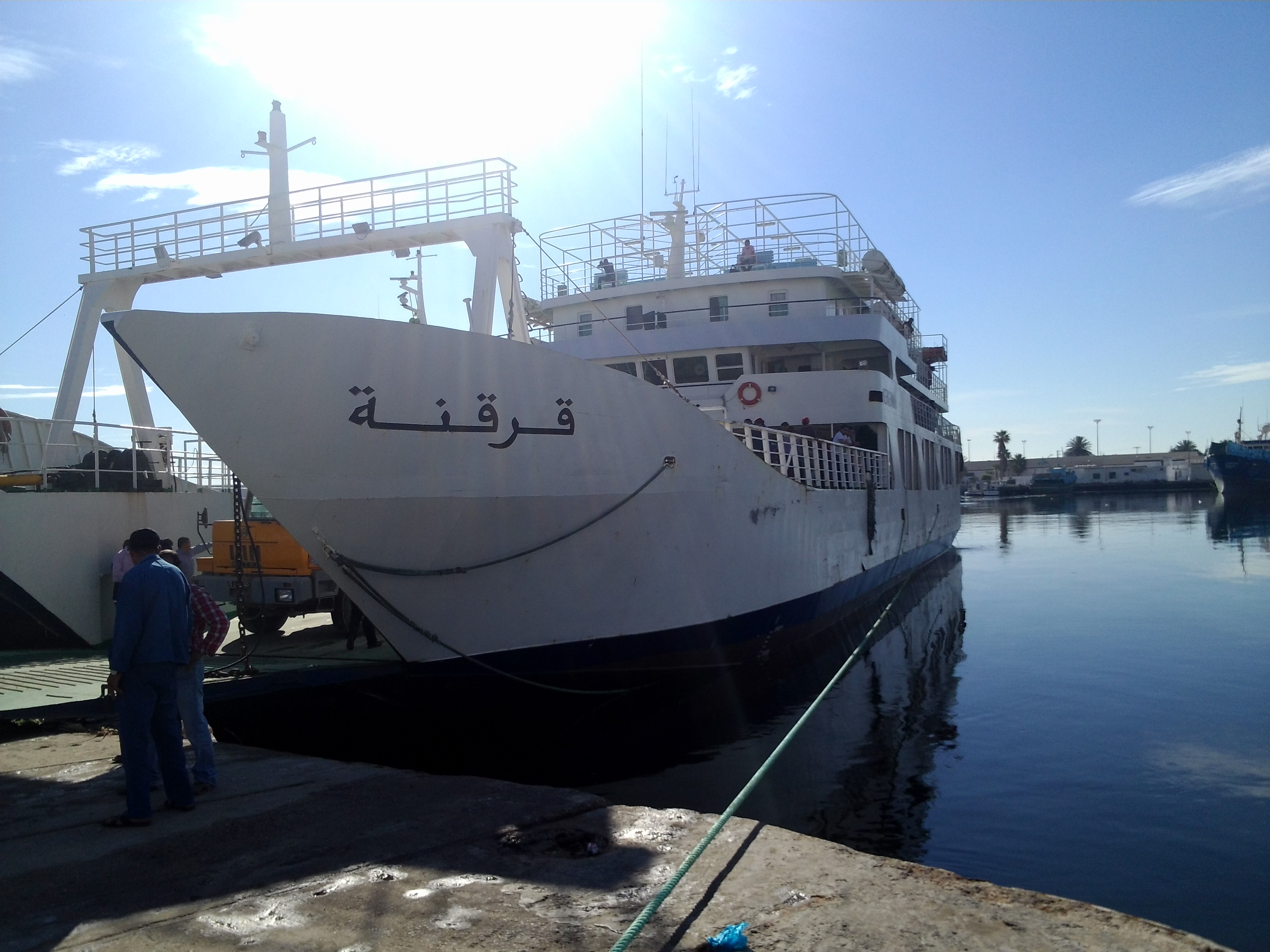 Паром на острови Керкенна у порту Сфакса